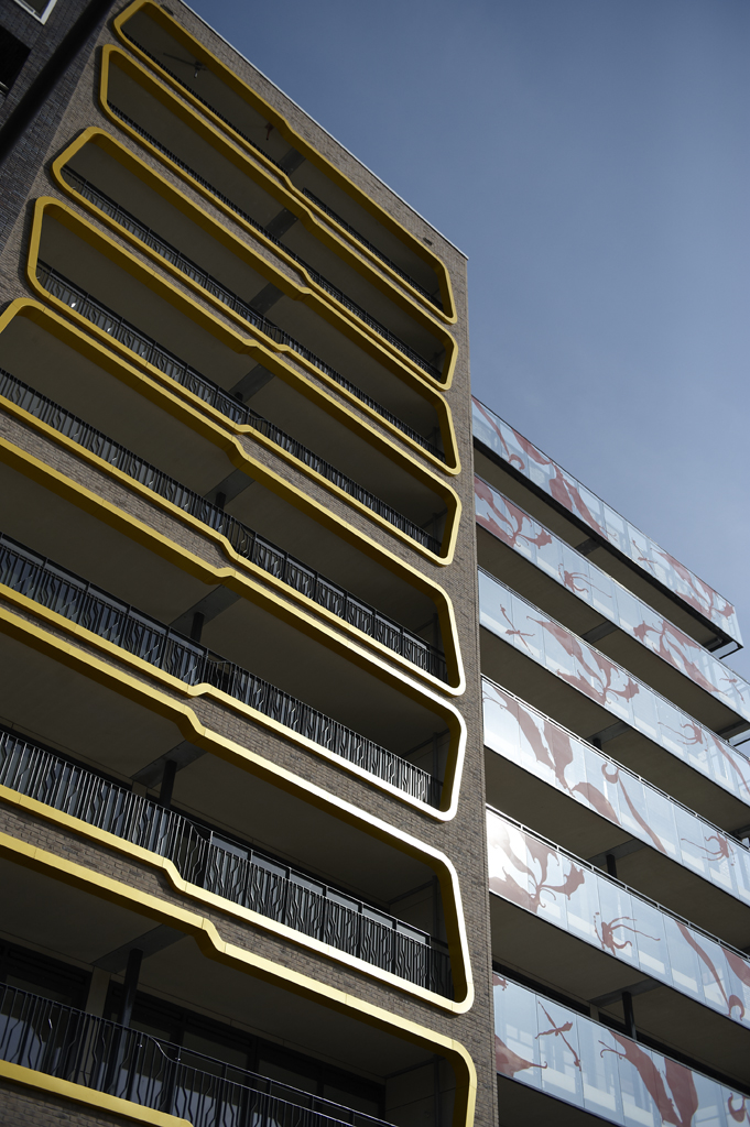 Detail van Jocator en Klusor, Lelystad, Zilverparkkade